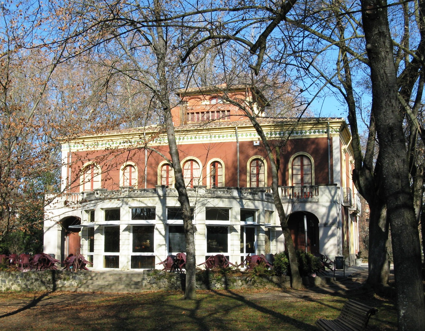 Volcano Museum Olot at Parc Nou (Catalunya)